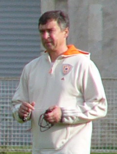 Геннадий Бондарук 2009